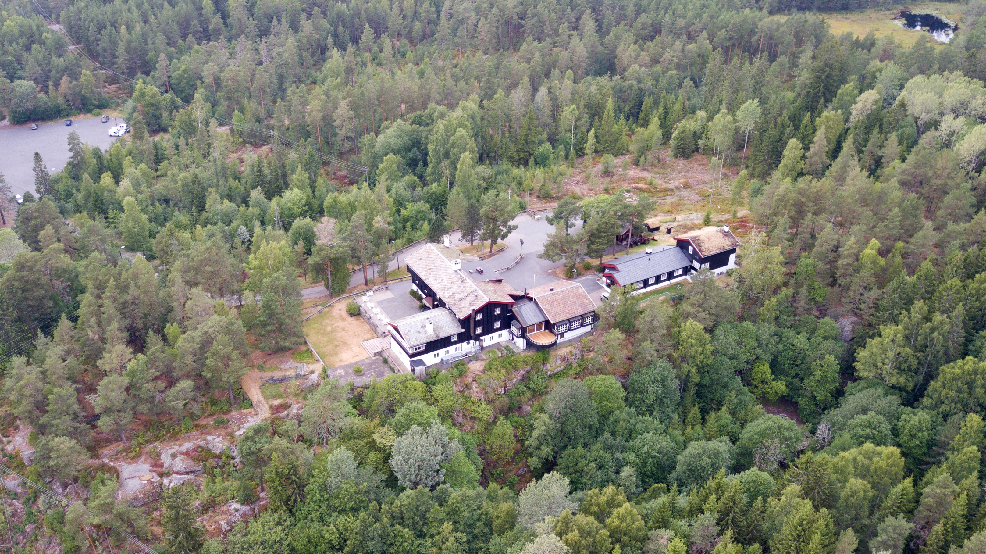 Østmarksetra i Oslo.